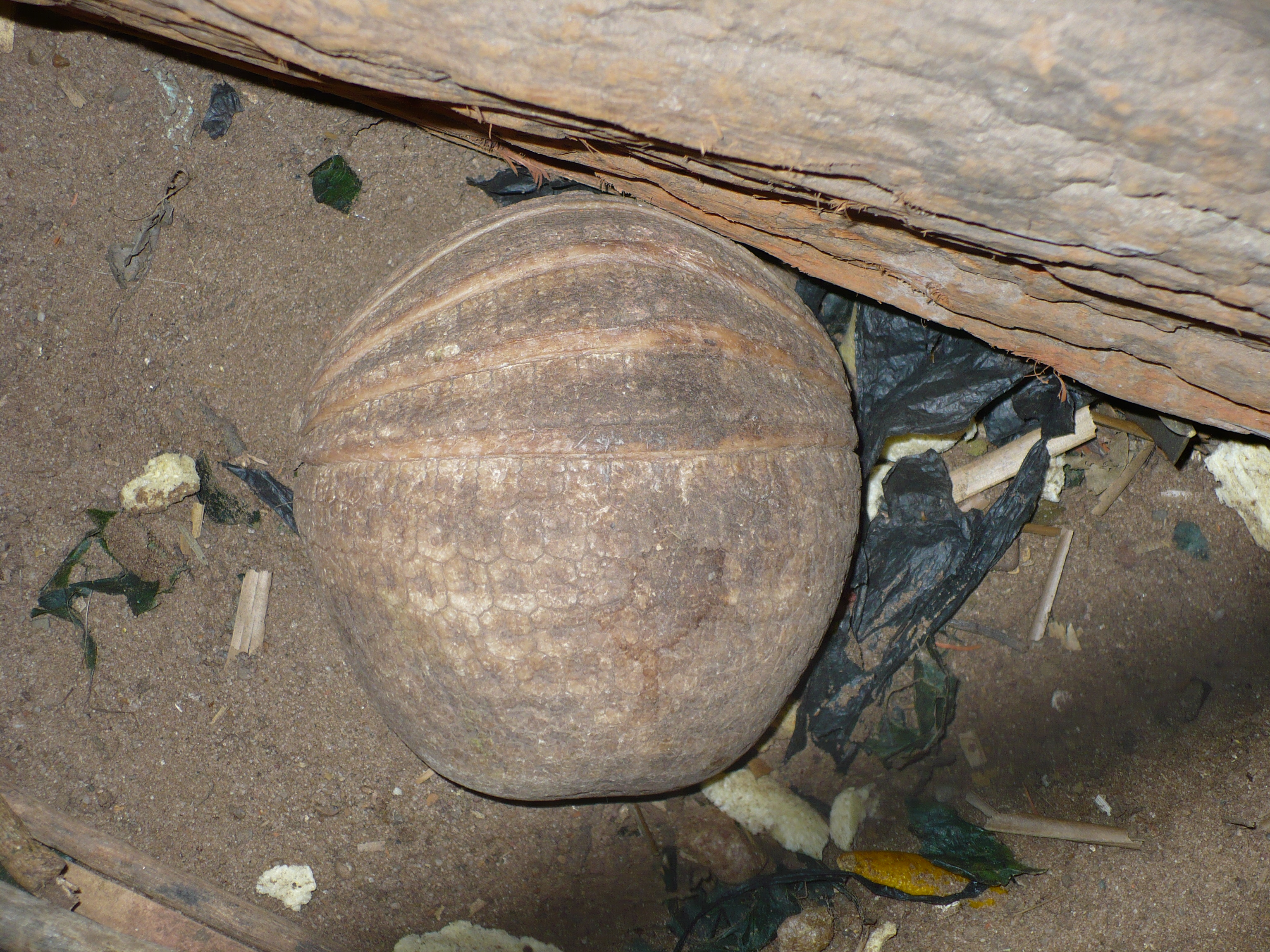 Tatou en boule au zoo de Santa Cruz, Bolivie